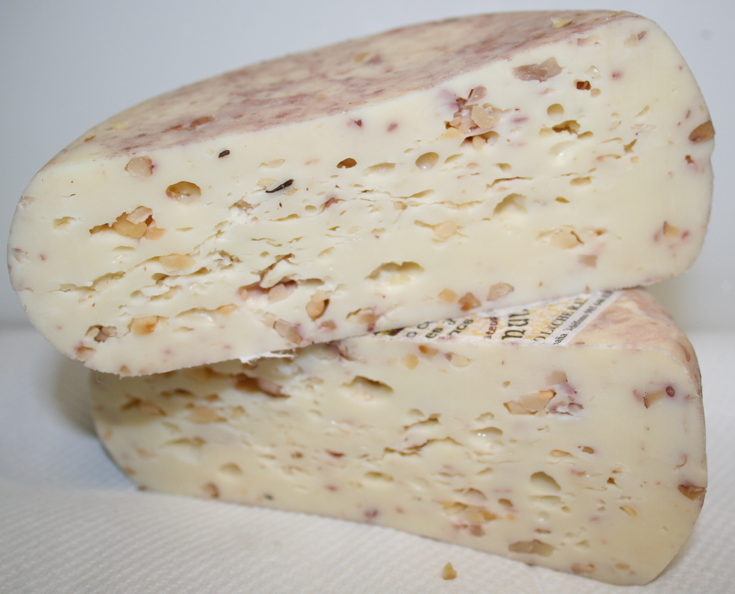 Interior del queso de Taramundi